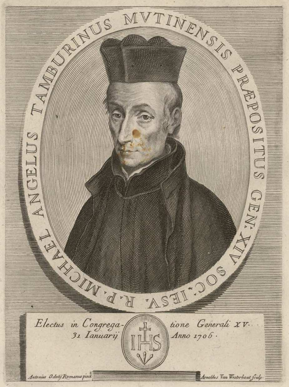 Michelangelo Tamburini. Grabado de Arnold von Westerhout para los "Ritratti de' prepositi generali della Compagnia di Gesù delineati, ed incisi da Arnaldo Van Westherhout", Roma, 1748. Biblioteca Nacional de España.